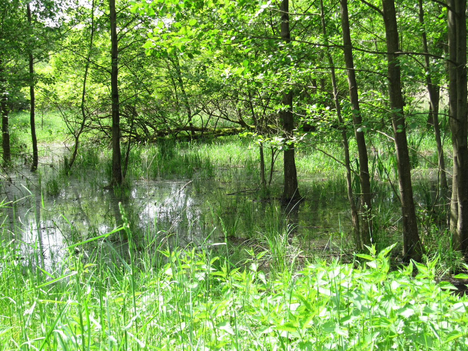 Der normale Wasserstand im Frühling im Droemling